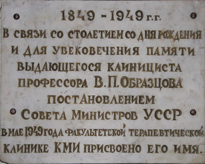 Меморіальна дошка Образцову В.П. Встановлена на другому поверсі кліничної лікарні №18 м. Києва